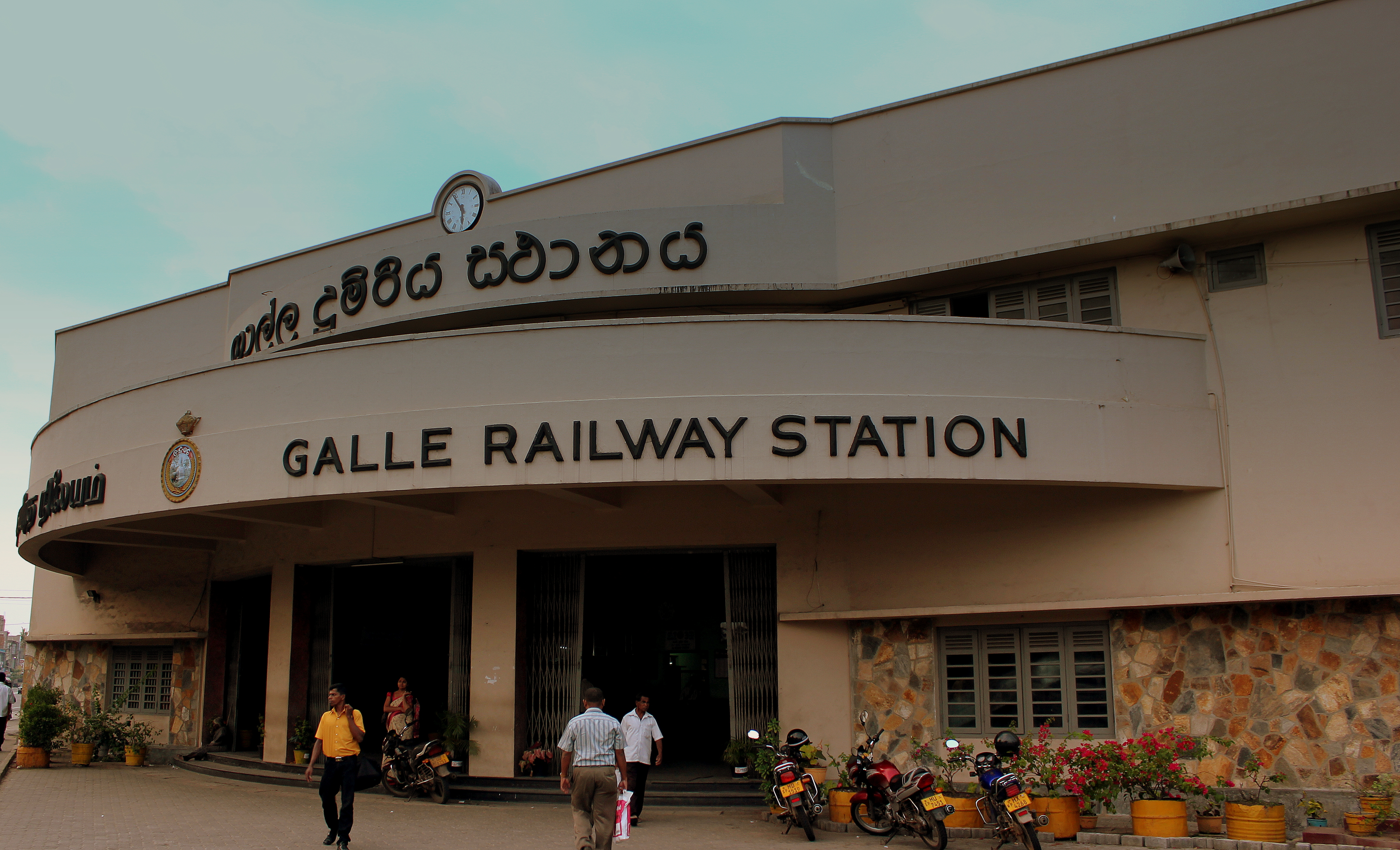 THIS STATION LIKE THE RAILWAY WAS BUILT BY BRITISH ENGINEERS